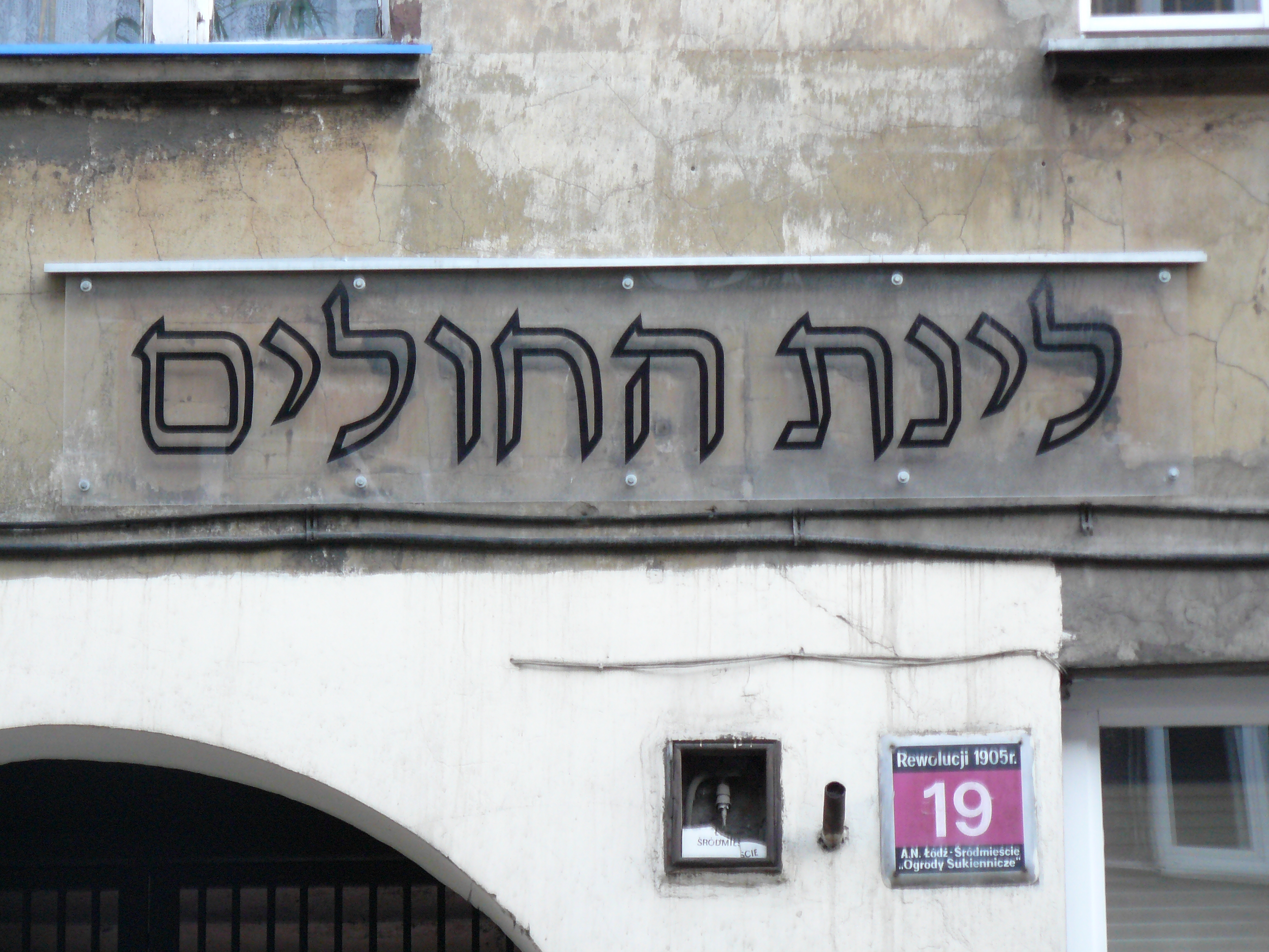 Szyld żydowskiego domu opieki Linas Hacholim przy ulicy Rewolucji 1905 r. w Łodzi, zabezpieczony pleksiglasem. Prawdopodobnie jedyny zachowany do dziś oryginalny napis hebrajski w mieście.